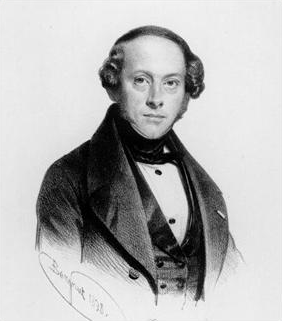 Portrait d'Édouard Mercier, ministre des Finances de Belgique